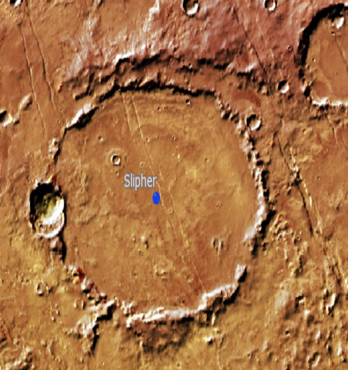 Cráter marciano Slipher. (Imagen IAU/USGS/Goddard/A SU/USGS)